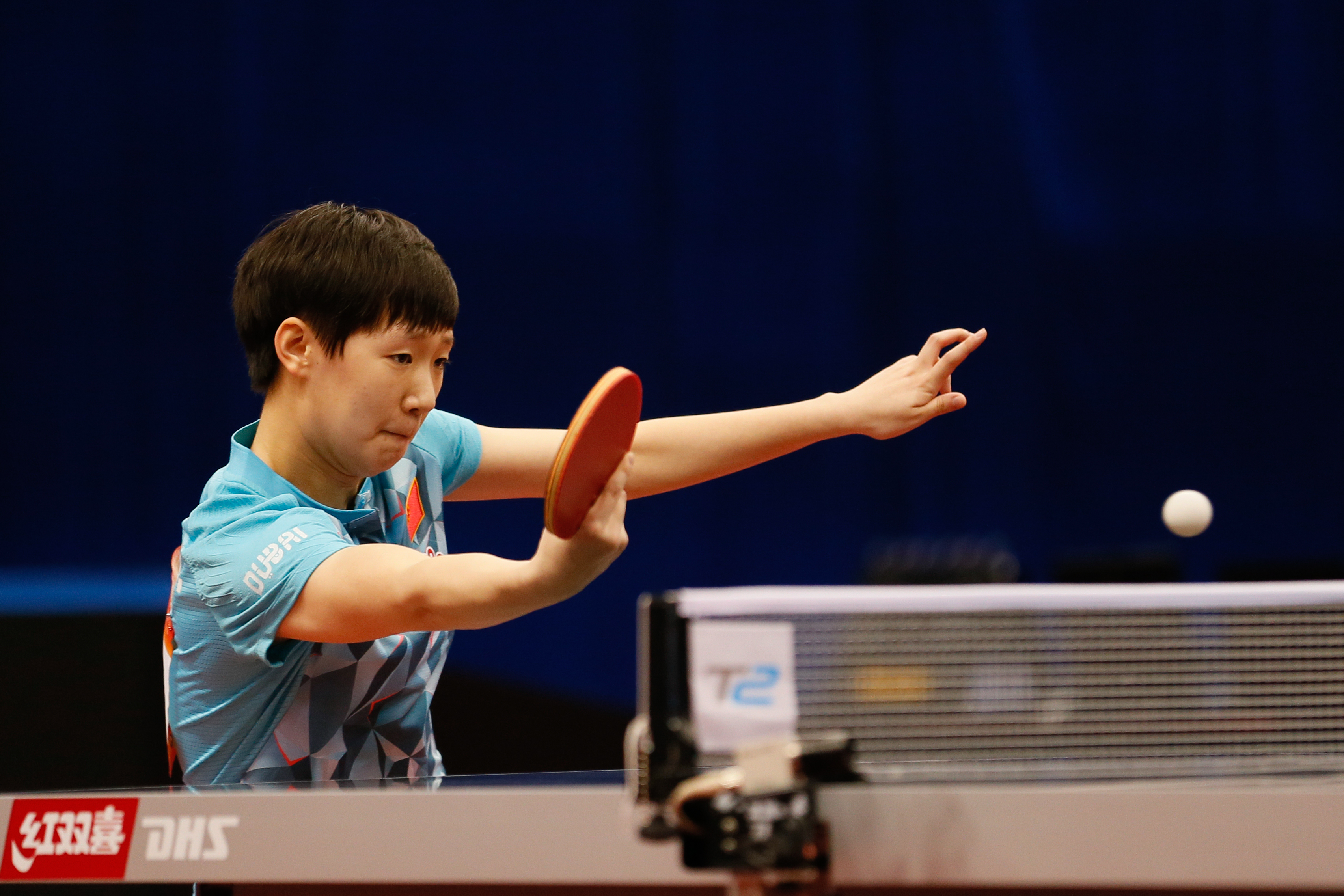 _K0K6710